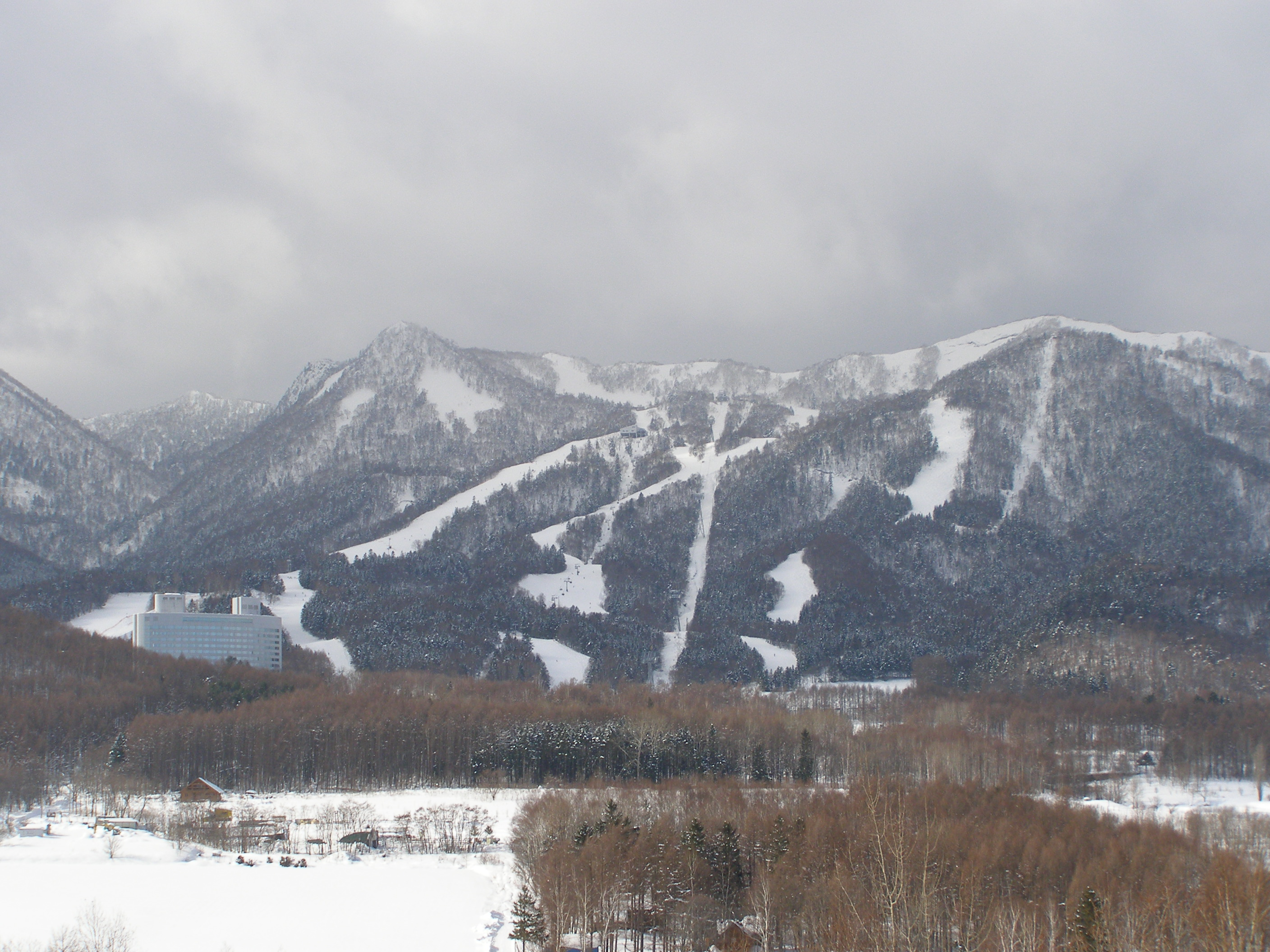 Furano Snow Resort Shinfurano aria (Hokkaido, JAPAN) 富良野スキー場新富良野ゲレンデ (北海道富良野市)